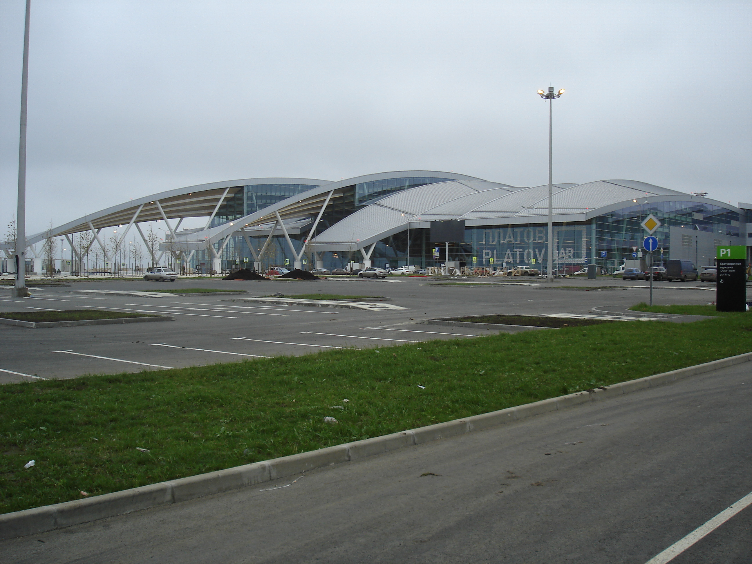 Аэропорт "Платов", ноябрь 2017, пасмурно